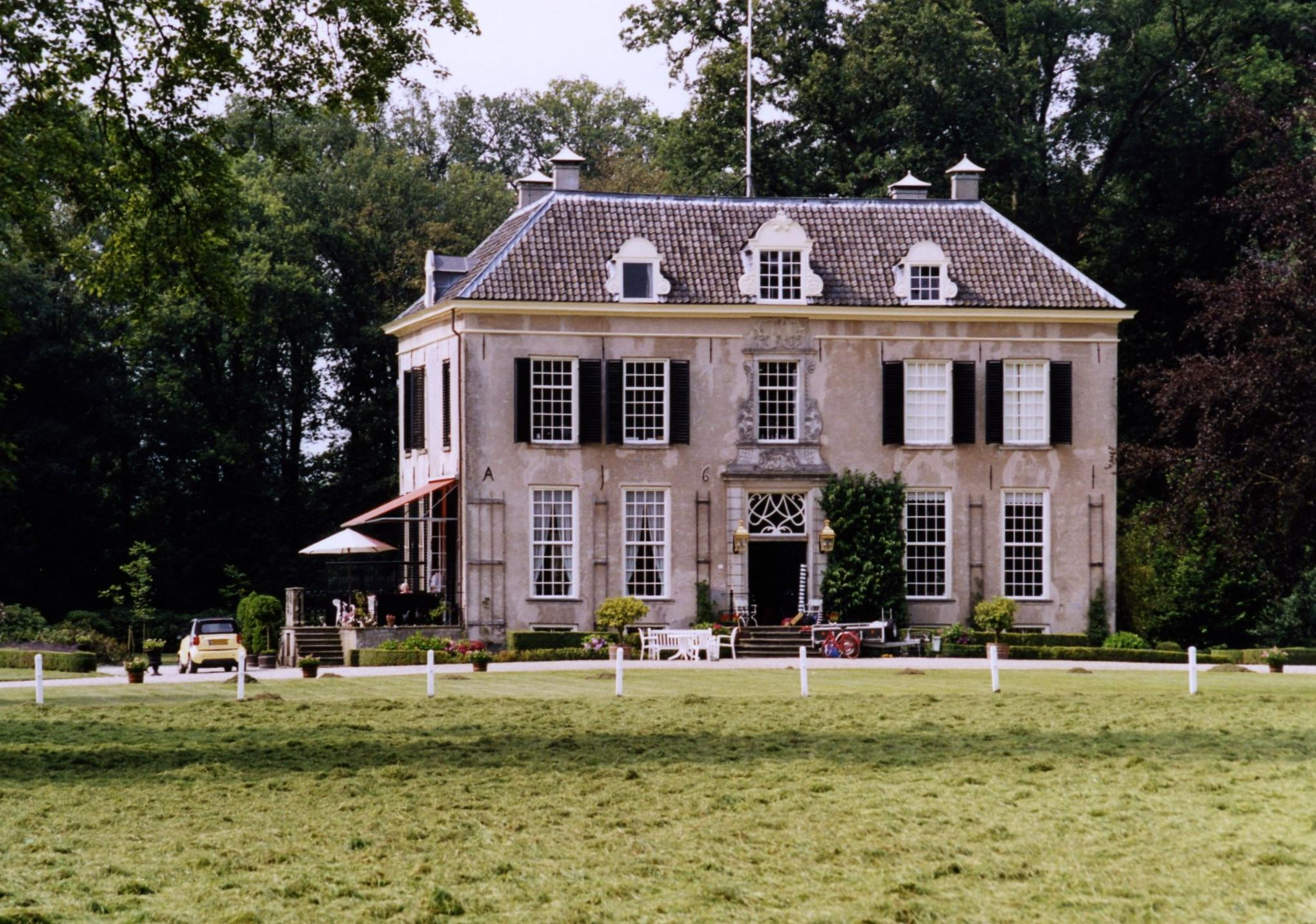 Kasteel Oolde te Laren.